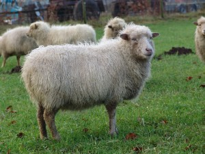 Witte Ouessant ooi